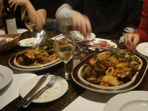 Caldeirada (Portuguese fish stew)